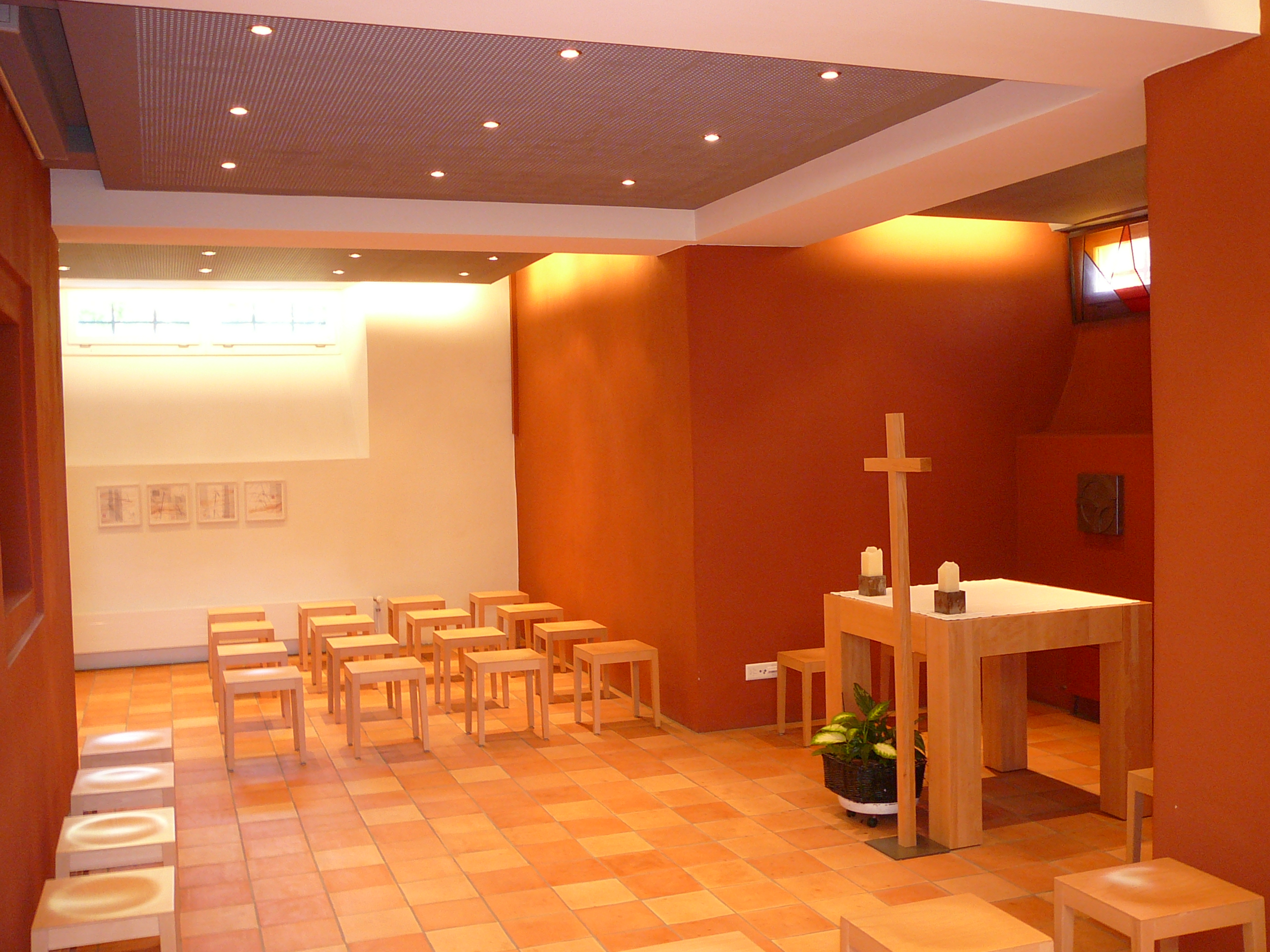 Dreifaltigkeitskirche Bülach Blick, Krypta